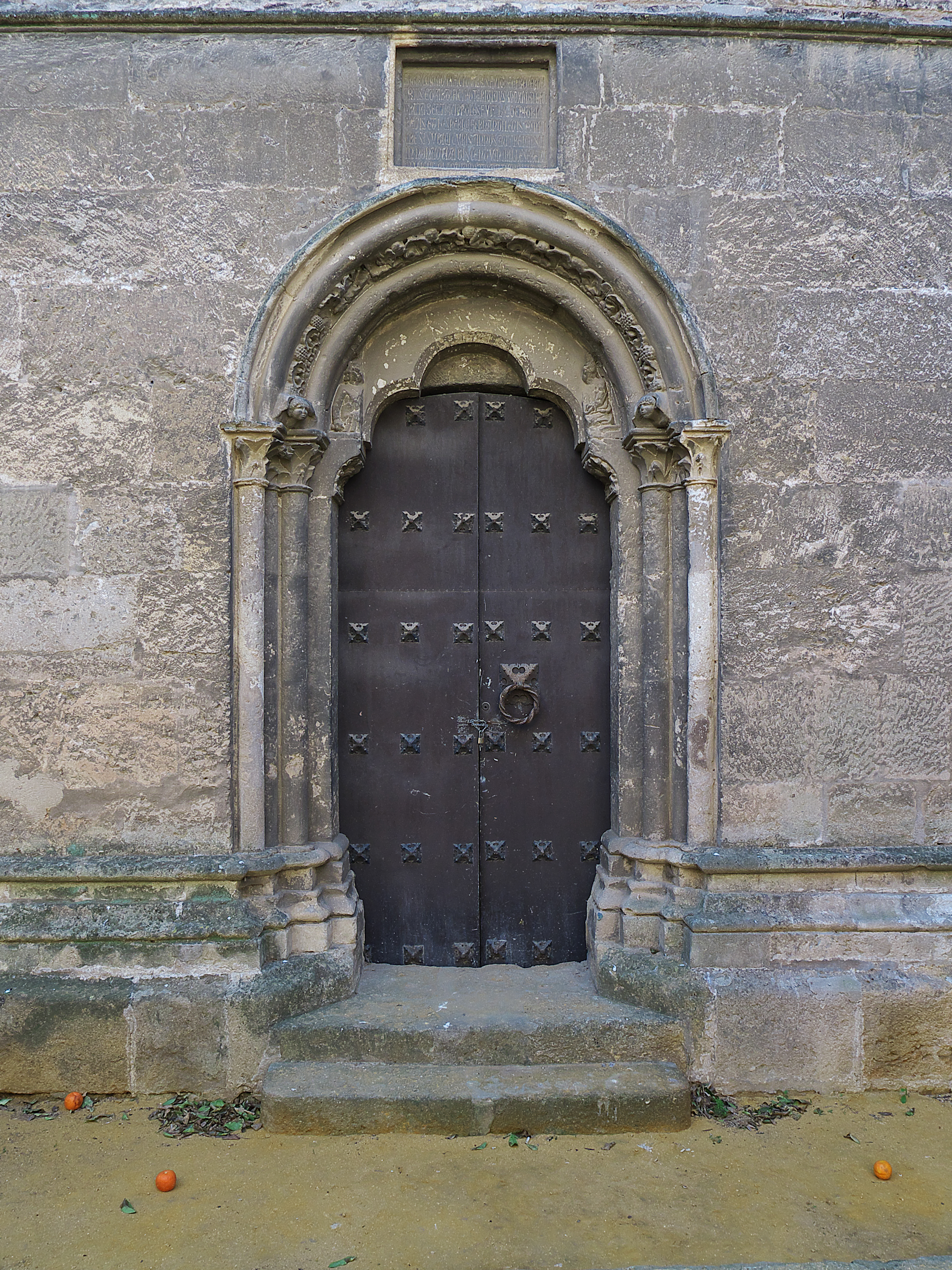 Palacio de Fadrique de Castilla (1223-1277), infante de Castilla, hijo de Fernando III de Castilla y Beatriz de Suabia. Puerta de la torre palacial con factura románica (1252)